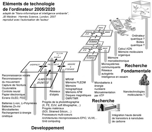 Évolution des technologies de l'ordinateur entre 2005 à 2020. Cette évolution s’articule autour de cinq blocs fonctionnels : le processeur, la mémoire et les dispositifs de stockage de masse, les réseaux et télécommunications, les dispositifs d’alimentation en énergie (notions de mobilité ou plus encore d’informatique diffuse obligent) et les interfaces entre la machine et l’utilisateur ou la machine et le milieu.